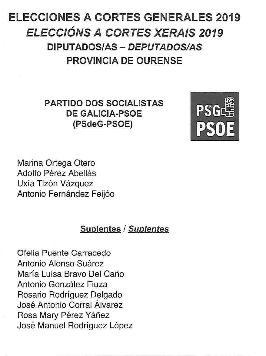 Papeleta electoral do Partido dos Socialistas de Galicia para o Congreso - Eleccións Xerais de España de 2019, circunscrición de Ourense